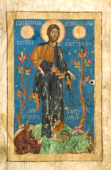 Список экспонатов СИМОНОВСКАЯ ПСАЛТИРЬ 1270–1296 годы Новгород 291 л. Пергамен; чернила, темпера, золото; переплет – дерево, кожа 27 х 18,5 х 11 Поступила в 1917 году На л. 98 запись писца: ...право отче Симоне не борзо ся пишет Происходит из собрания московского торговца старообрядца А.И. Хлудова, которое, согласно его завещанию, была передана в Никольский Единоверческий монастырь в Москве ГИМ инв. 86795, ОР Хлуд. 3